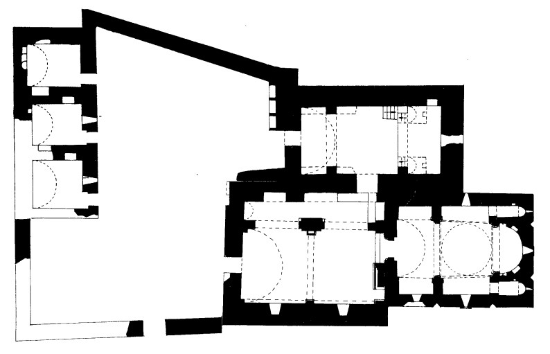 Qtiçavəng monastırının planı